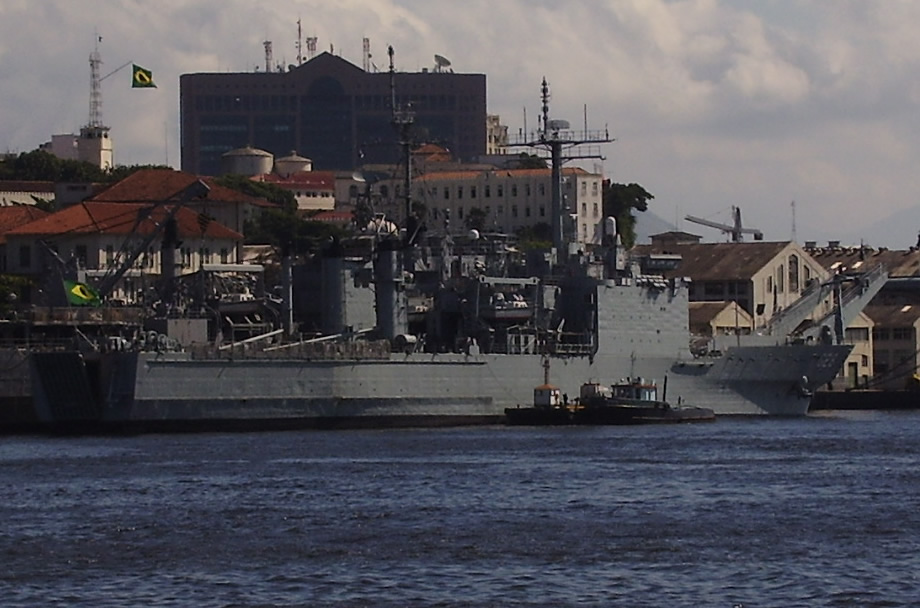 NDCC Mattoso Maia - Arsenal de Marinha - RJ